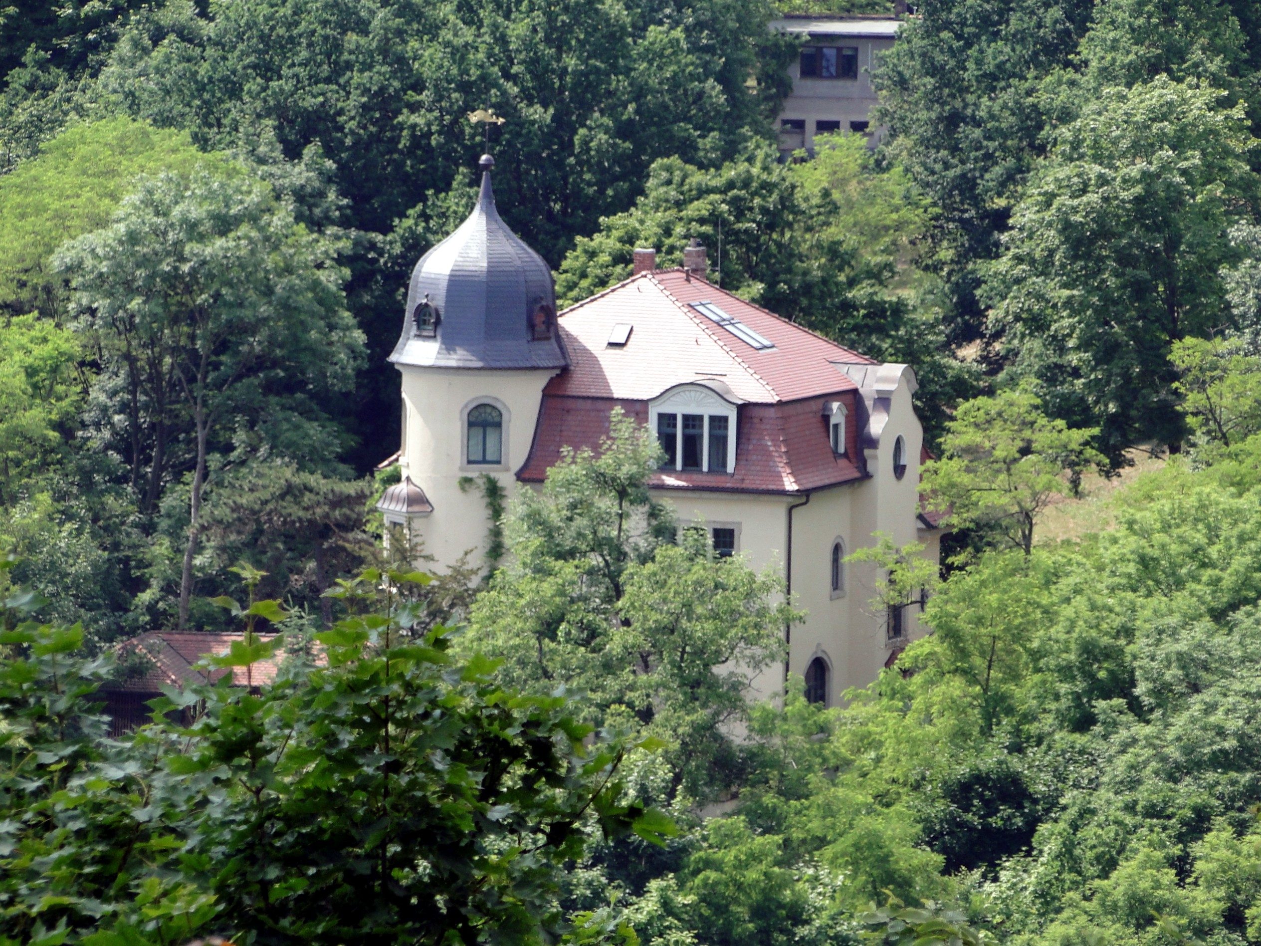 Villa Max Kuntze in Radebeul, vom Aussichtspunkt Pfeifferweg aus fotografiert